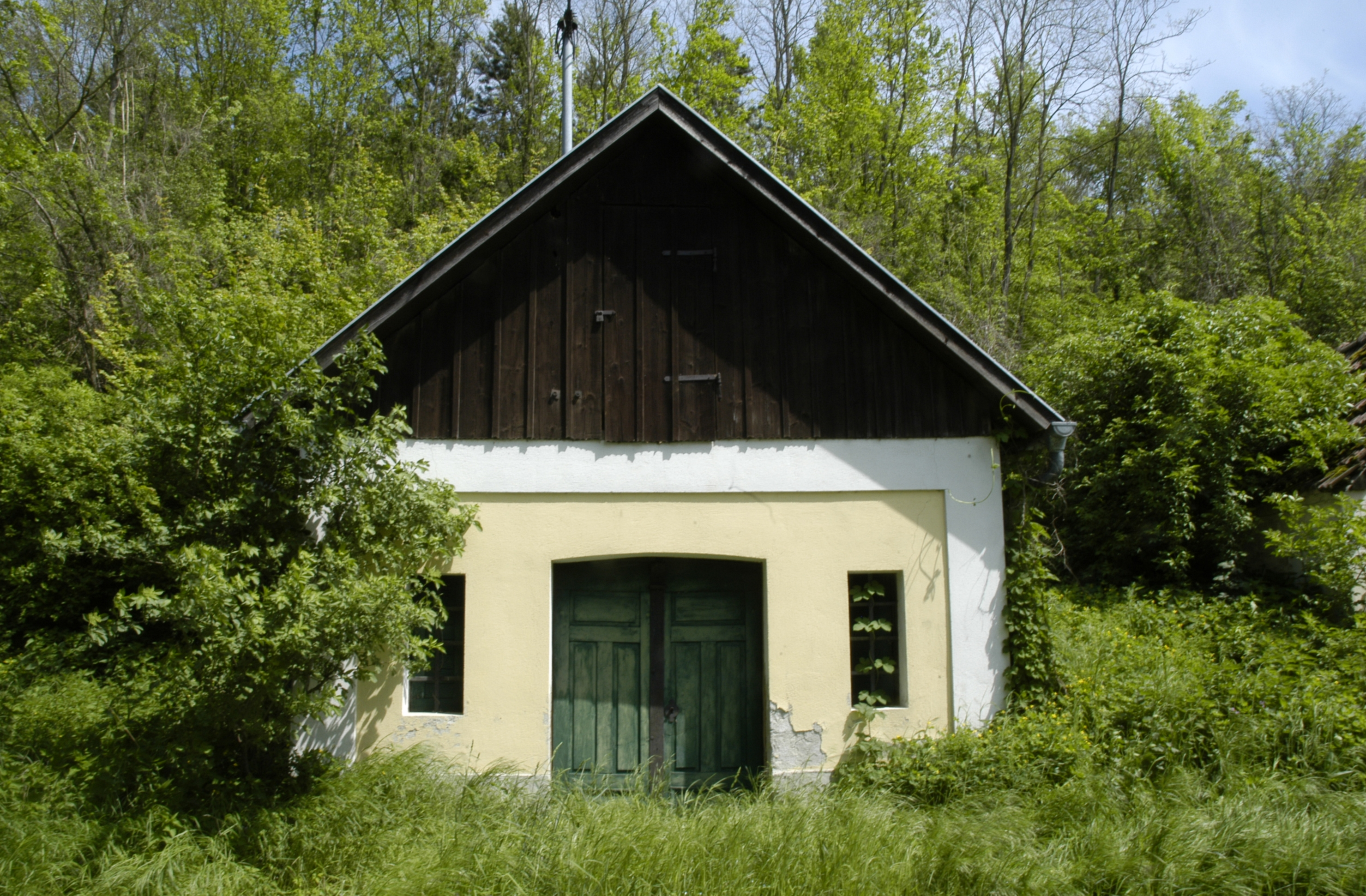 Objekt in der Mühlkellergasse in Frauendorf an der Schmida